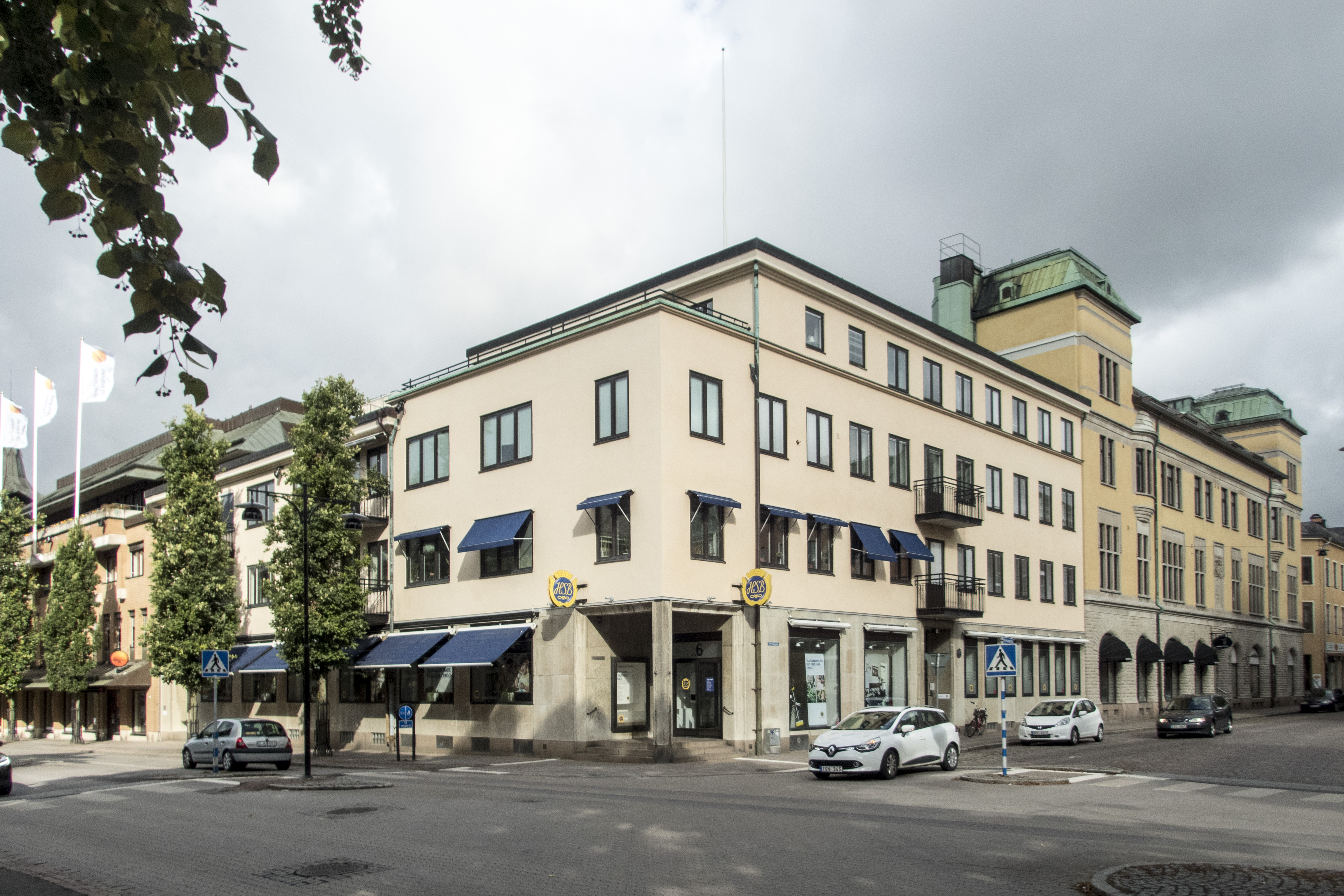 Sparbankens tillbyggnad, Järnvägsgatan Skara. Byggnadsår 1933-1939. Arkitekt Jacob J:son Gate